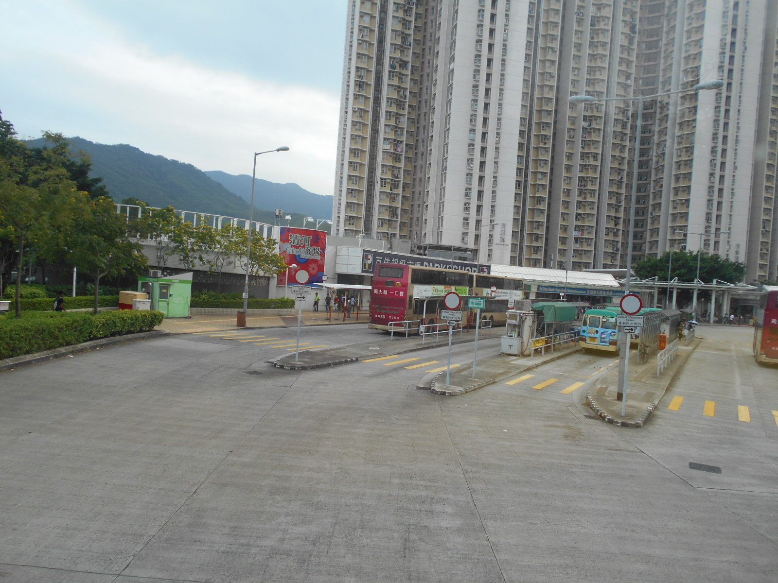 中文（香港）: 清河邨巴士總站(2016年)